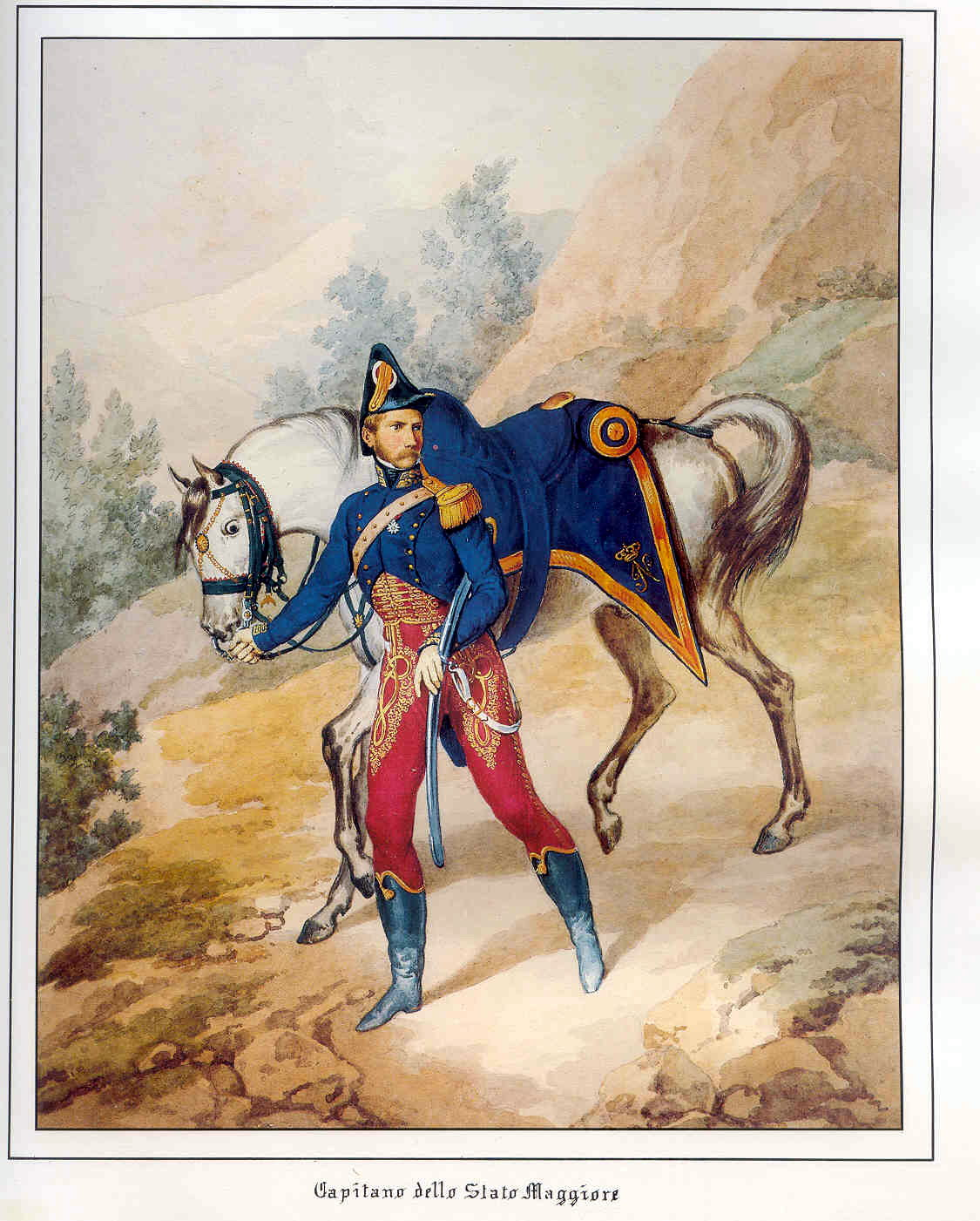 Capitaine de l'état-major de Joachim Murat, roi de Naples. Estampe d'époque.